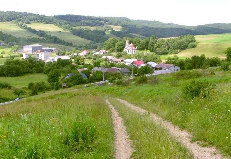 Celkový pohľad